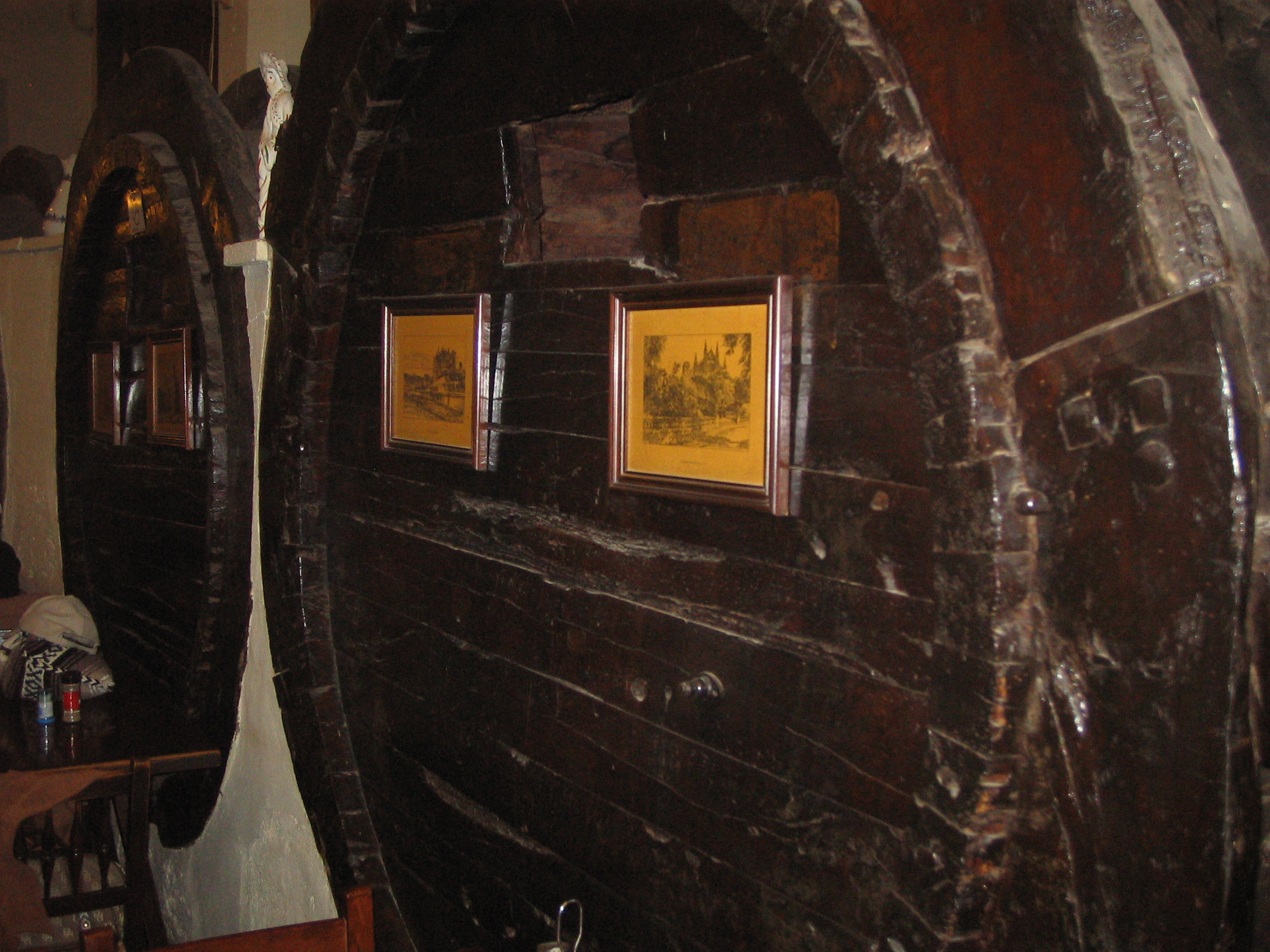 2 toneles gigantes de vino del celler mallorquín Sa Premsa.